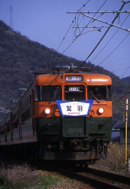 リバイバル鷲羽 2002年3月30日 宇野線 常山〜八浜